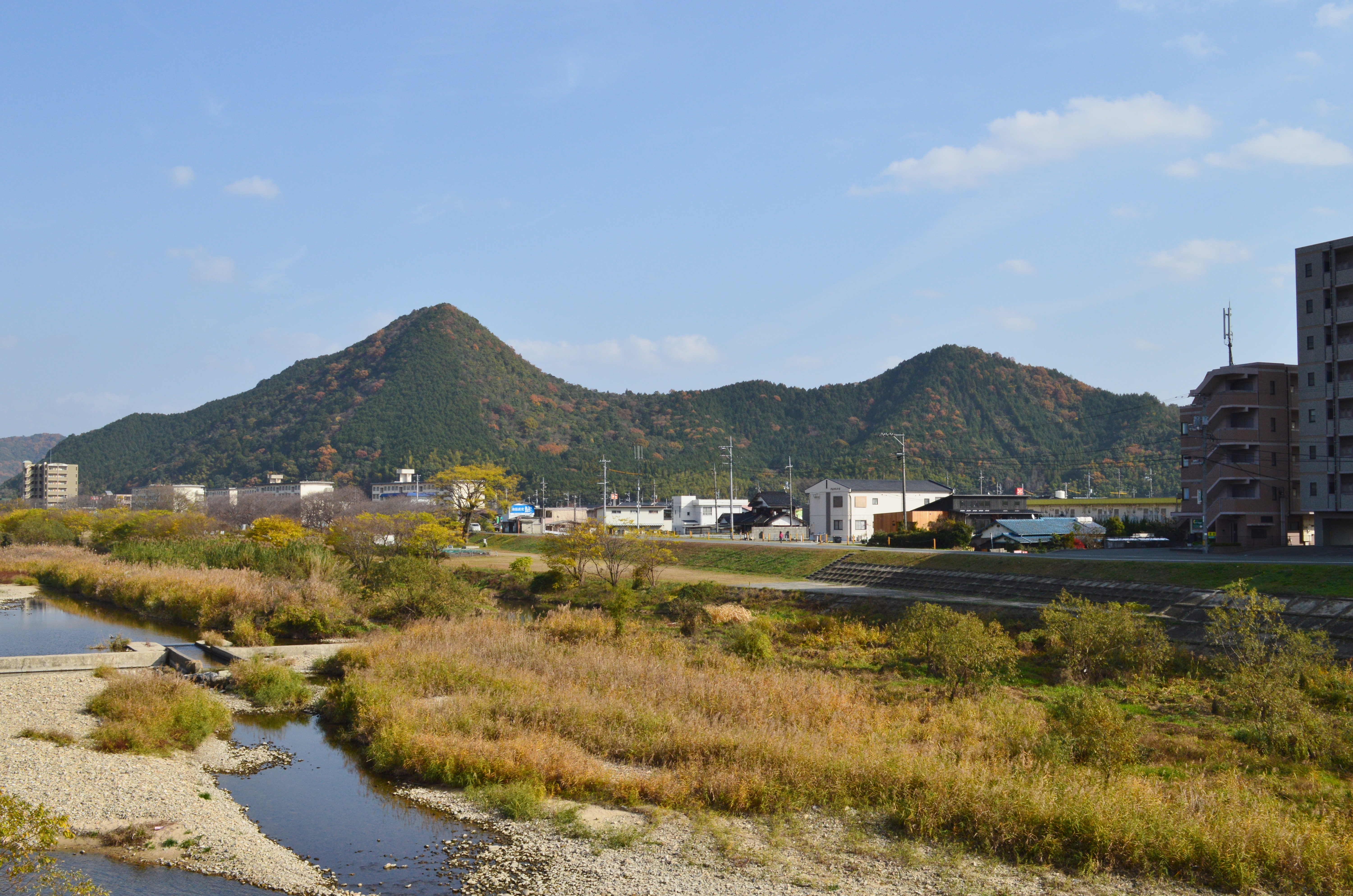 椹野川から望む姫山 (山口県)